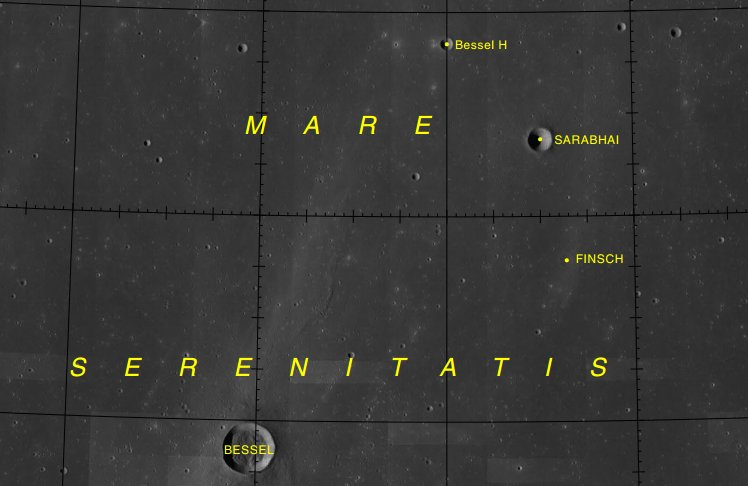 Cráter lunar Finsch. Localización) (Imagen LROC)